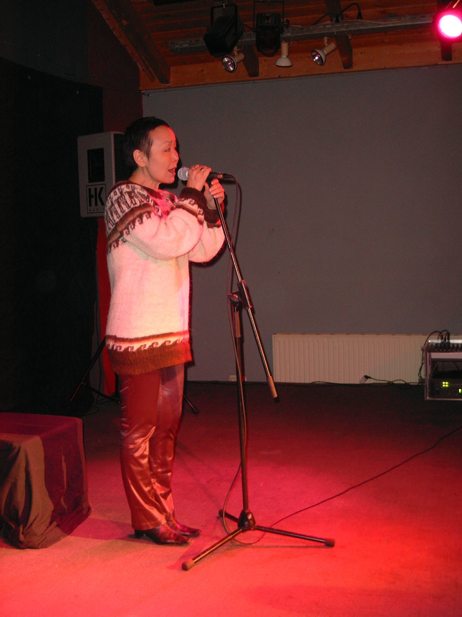 Sainkho Namchylak im Club W71 in Weikersheim Sonstiges: ...